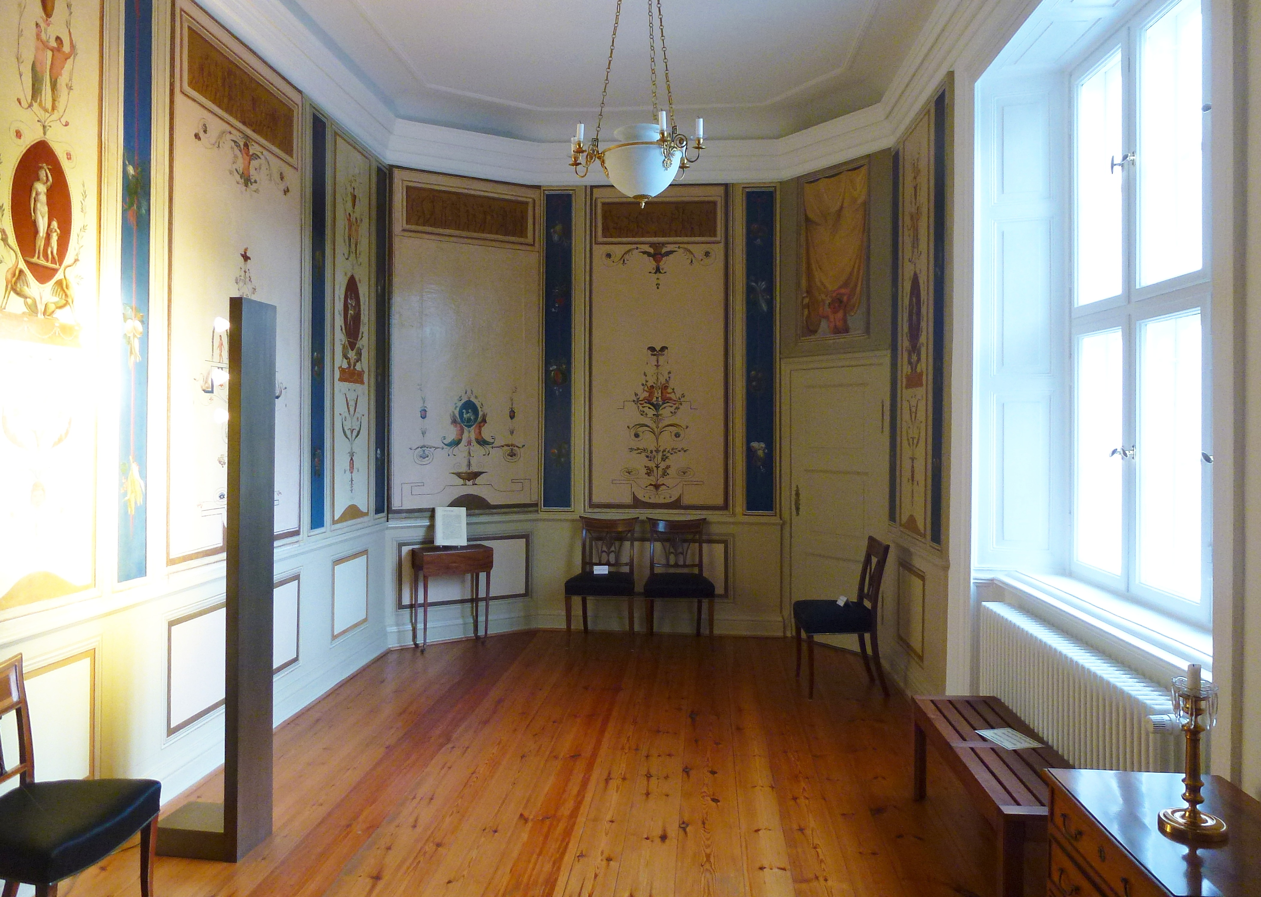 Schloss Ahrensburg Pellicia-Kabinett